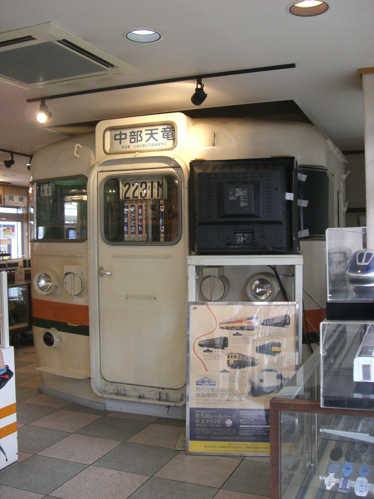 クハ66002の前面を利用した運転シミュレータ（佐久間レールパーク）